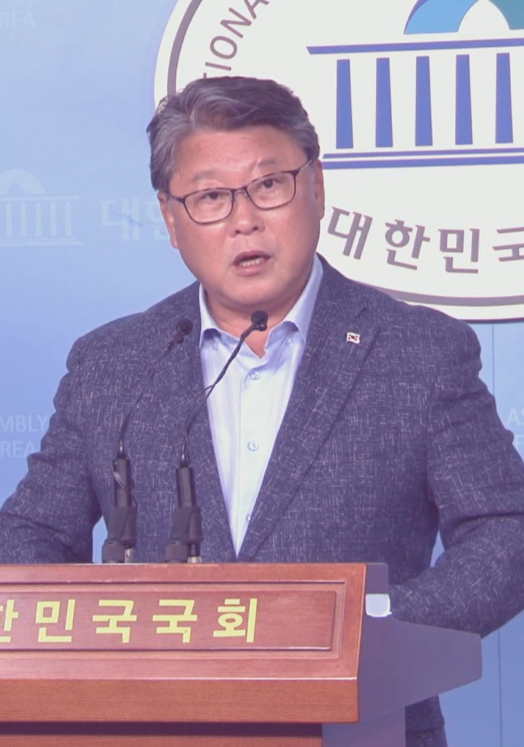 정론관에서 성명서를 발표하는 조원진 우리공화당 대표.